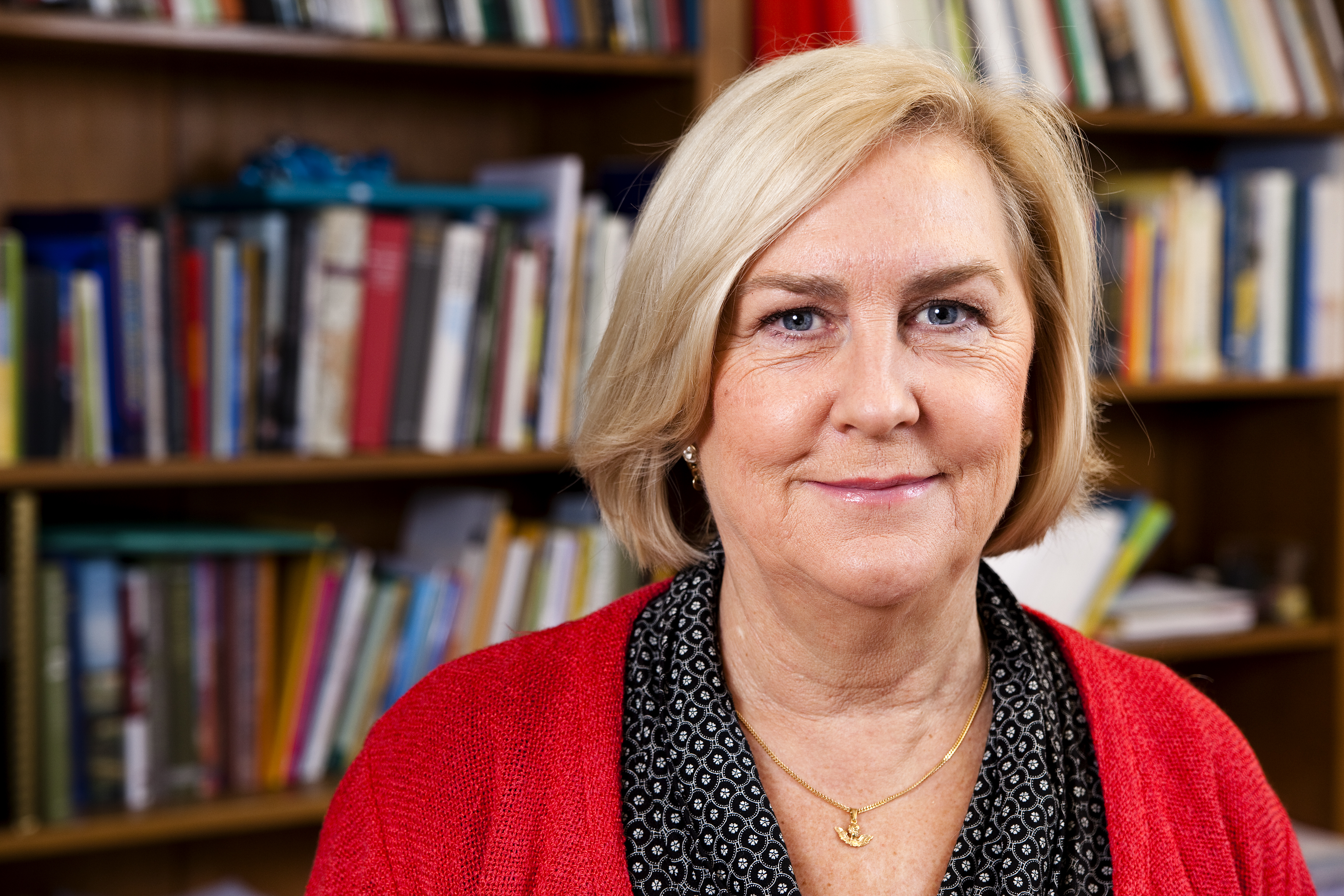 Ewa Samuelsson (KD), äldreborgarråd och gruppledare för Kristdemokraterna i Stockholms stad. Ordförande i Micasa Fastigheter AB och Personal- och jämställdhetsutskottet i Stockholms stad